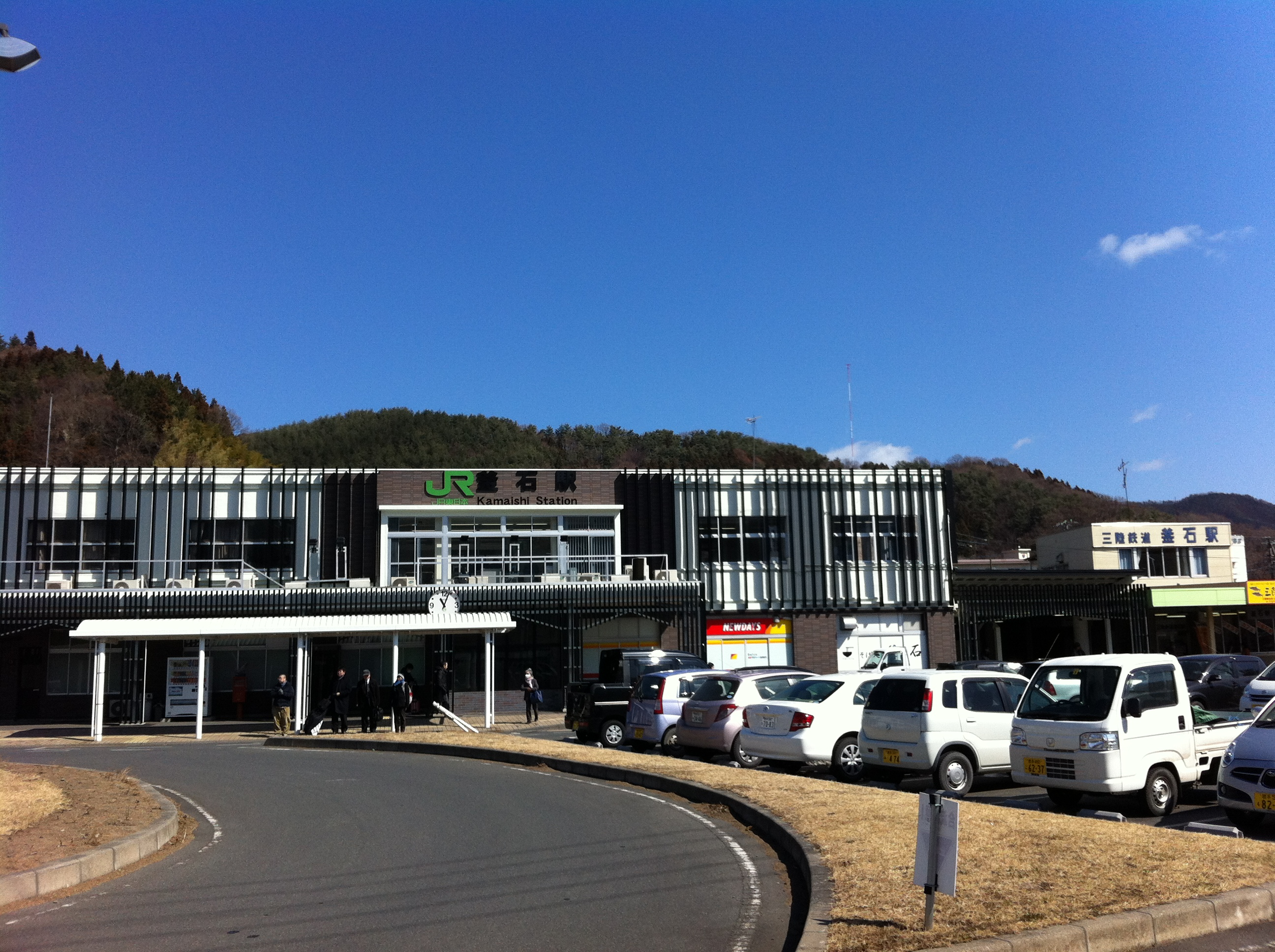 JR釜石駅、三陸鉄道釜石駅